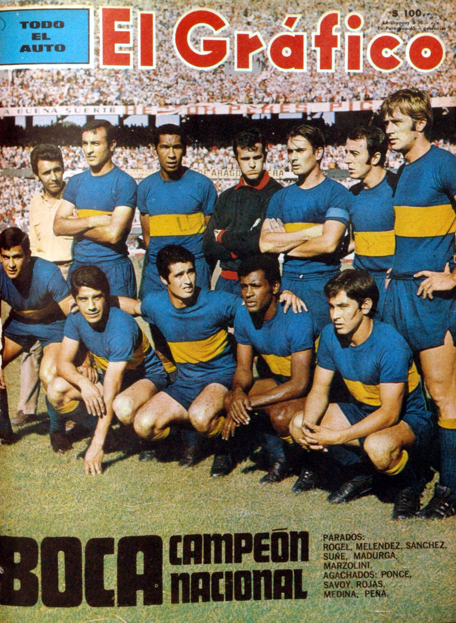 El Grafico del 16 de Diciembre de 1969. Edicion 2619